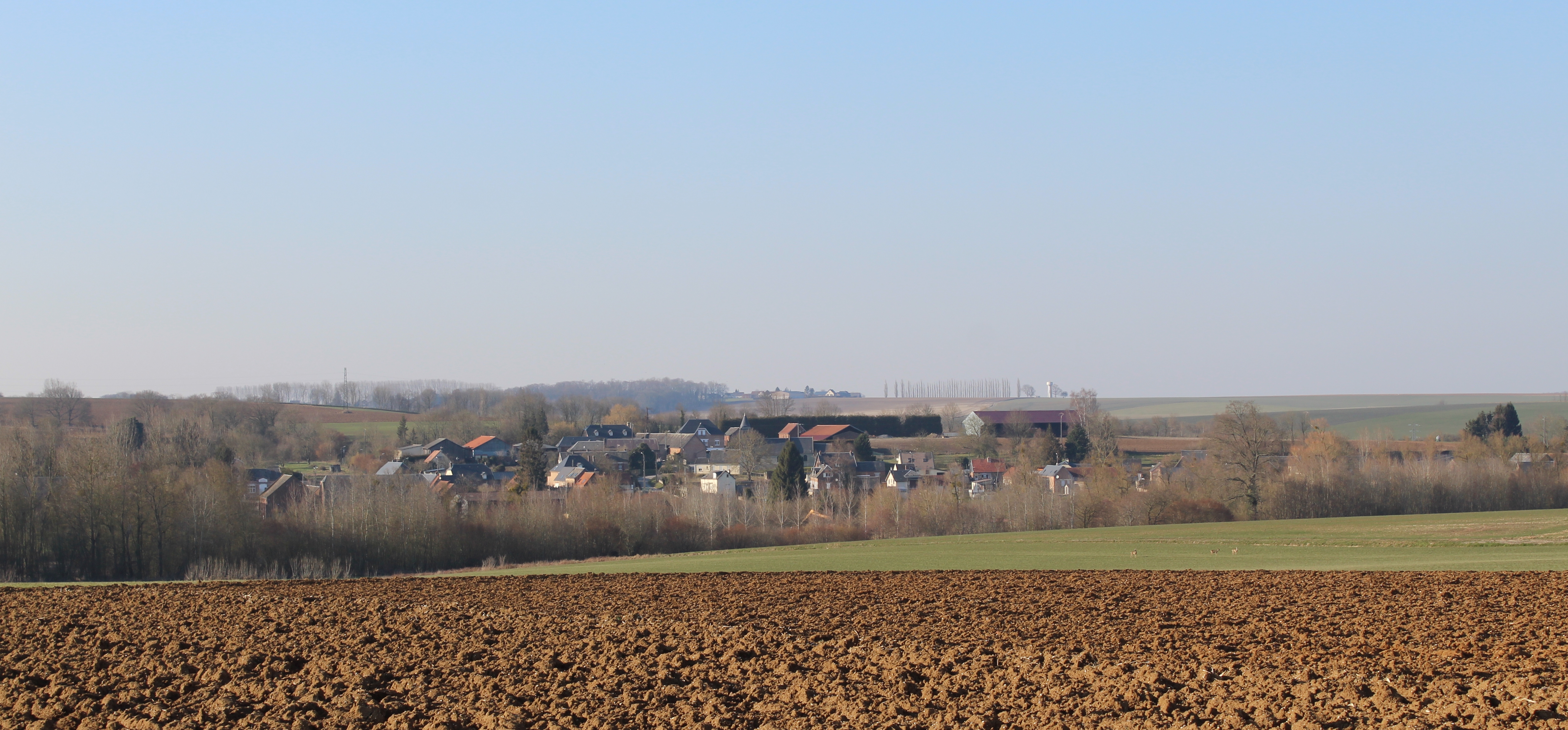 Vue du village depuis la route de Ribemont.